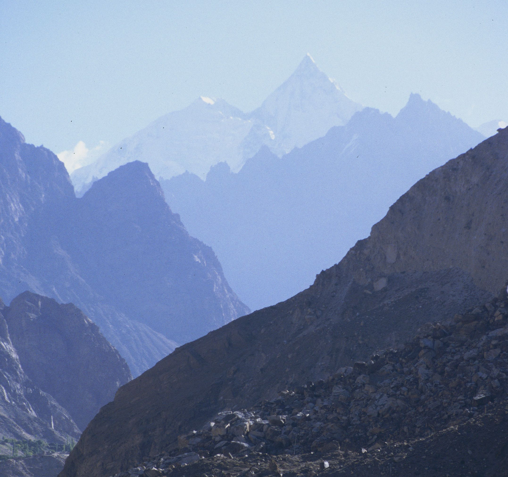 Karakorum im Morgenlicht, in der Ferne der Lupghar Sar (7200 m)